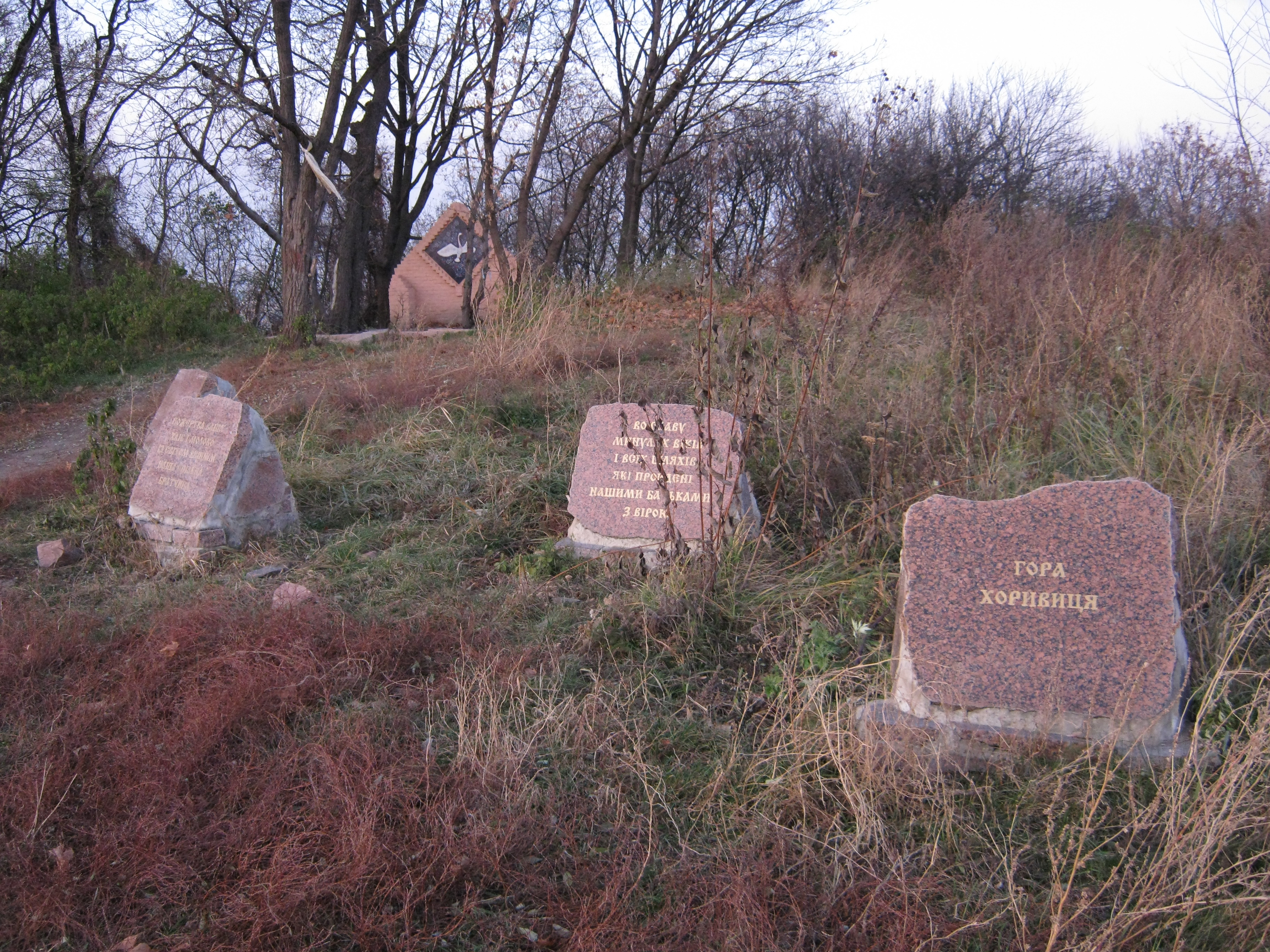 Пам'ятні знаки на честь зоснування Київа Києм, Щеком, Хоривом та їх сестрою Либіддю. Замкова гора (вона ж Хоревиця). За легендою, саме з цієї гори розпочав свою історію славетний Київ.